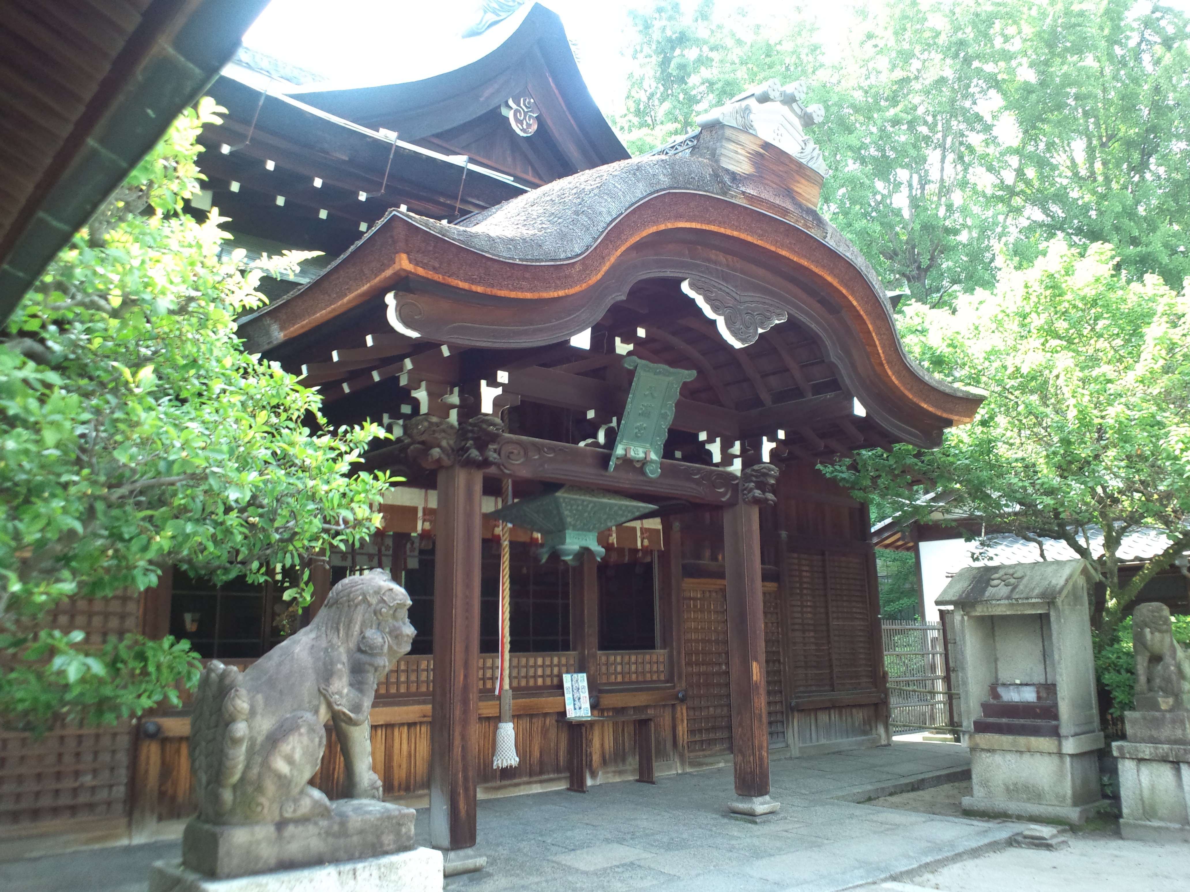 菅大臣神社（菅大臣天満宮） 拝殿